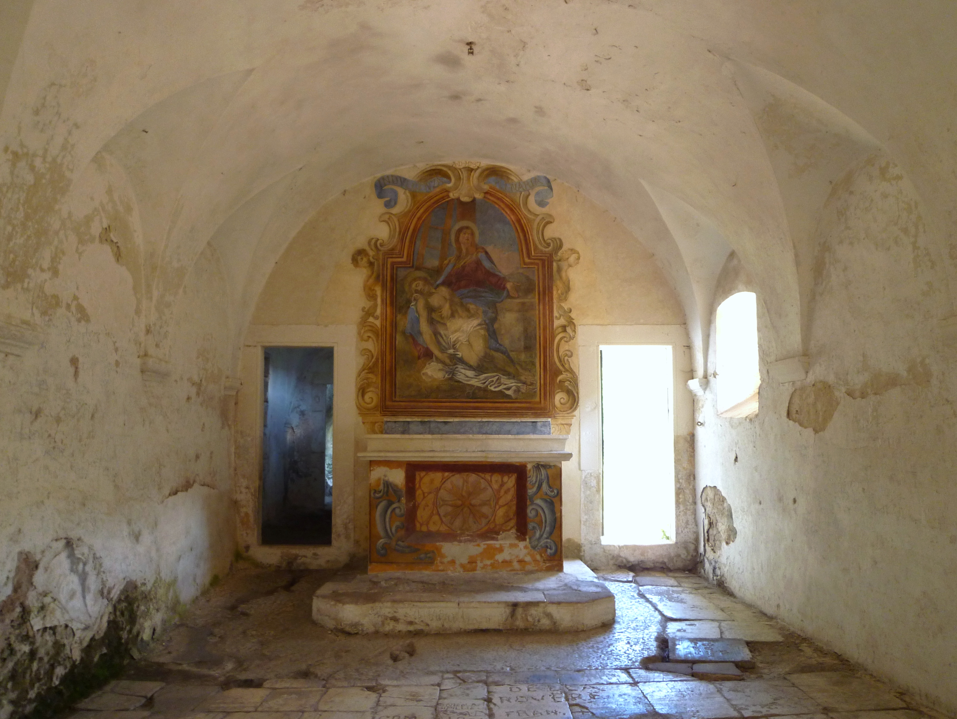 Eremo di Santo Spirito a Majella. Roccamorice, Pescara.